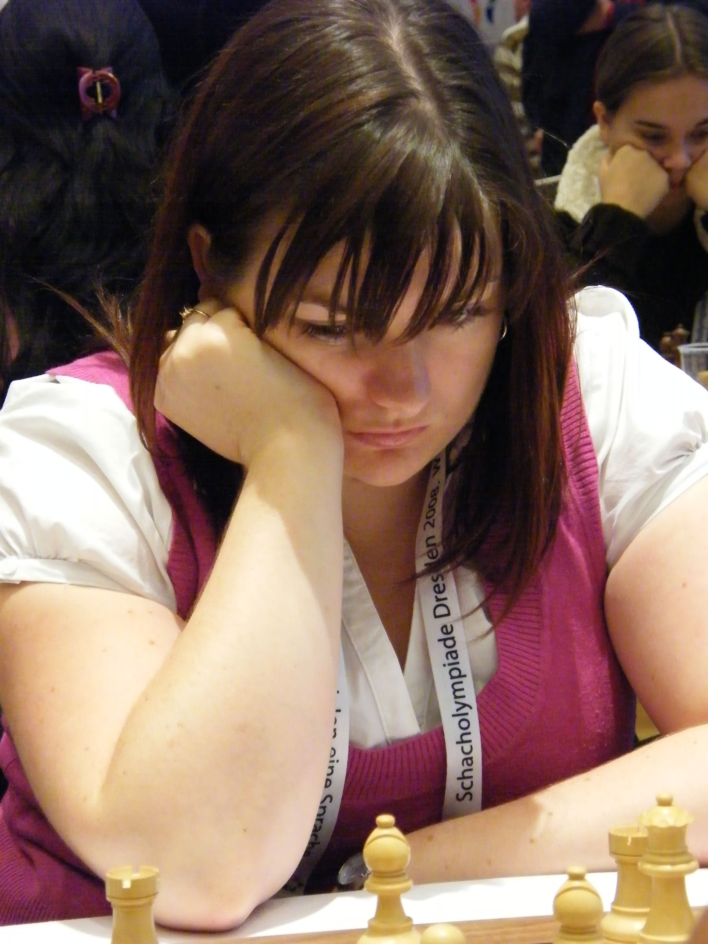 Laura Moylan bei der 38. Schacholympiade in Dresden 2008